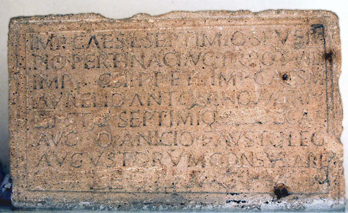 Das Kastell Gholaia, das durch antike Quellen auch als castra Chol(aia), [G]olas sowie in der Tabula Peutingeriana als Chosol überliefert ist, war ein römisches Militärlager, das für Sicherungs- und Überwachungsaufgaben am vorderen Limes Tripolitanus, einem tiefgestaffelten System von Kastellen und Militärposten, in der römischen Provinz Africa proconsularis zuständig war. Bauinschrift des Kastells vom Zugang des nördlichen Lagertors; höchstwahrscheinlich aus dem Gründungsjahr des Kastells 201 n. Chr. Aufbewahrt im Leptis Magna Museum in Libyen. Der Name des Kaisers Publius Septimius Geta (211) wurde durch dessen Bruder, dem Kaiser Caracalla (211–217), nach seiner Ermordung teilweise eradiert. Aufgrund ihrer Treue zu Kaiser Maximinus Thrax und dessen ihm loyal gebliebenen numidischen Statthalter Capelianus bei der Unterdrückung des Usurpators Gordian I. (238) ließ der nachfolgende Kaiser Gordian III. (238–244) die Legio III Augusta auflösen und den Namen der Legion ebenfalls eradieren. Imp(eratori) Caes(ari) L(ucio) Septimio Severo Pio Pertinaci Aug(usto) tr(ibunicia) p(otestate) VIIII Imp(eratori) co(n)s(uli) II p(atri) p(atriae) et Imp(eratori) Caes(ari) M(arco) Aurelio Antonino Aug(usto) tr(ibunicia) p(otestate) [IIII] et [L(ucio)] Septimio [Getae] Caes(ari) Aug(usto) Q(uinto) Anicio Fausto leg(ato) Augustorum consulari [leg(ionis) III Aug(ustae) P(iae) V(indicis)]